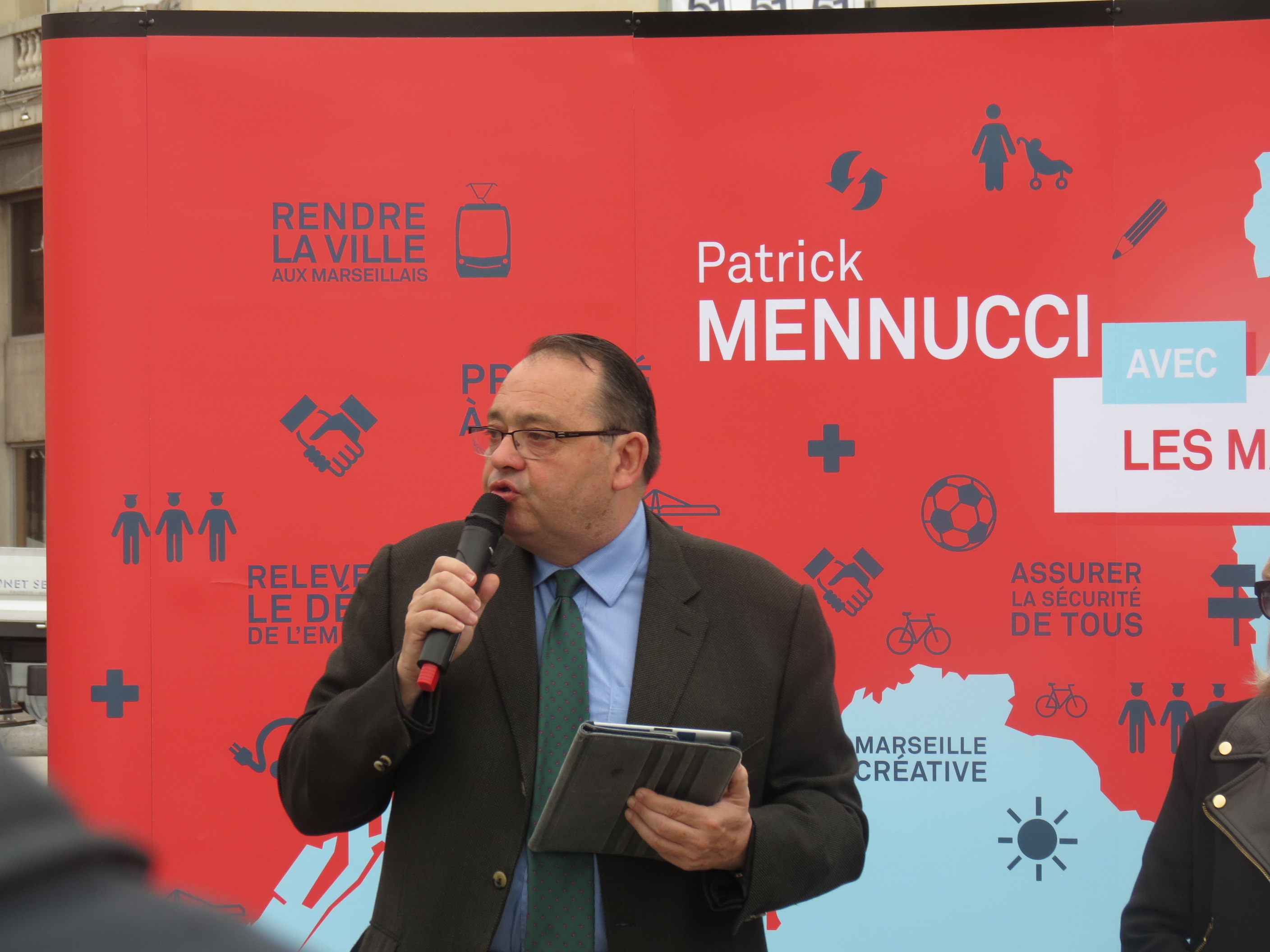 Meeting de rue de Patrick Mennucci en le 27 avril 2013, à Marseille.